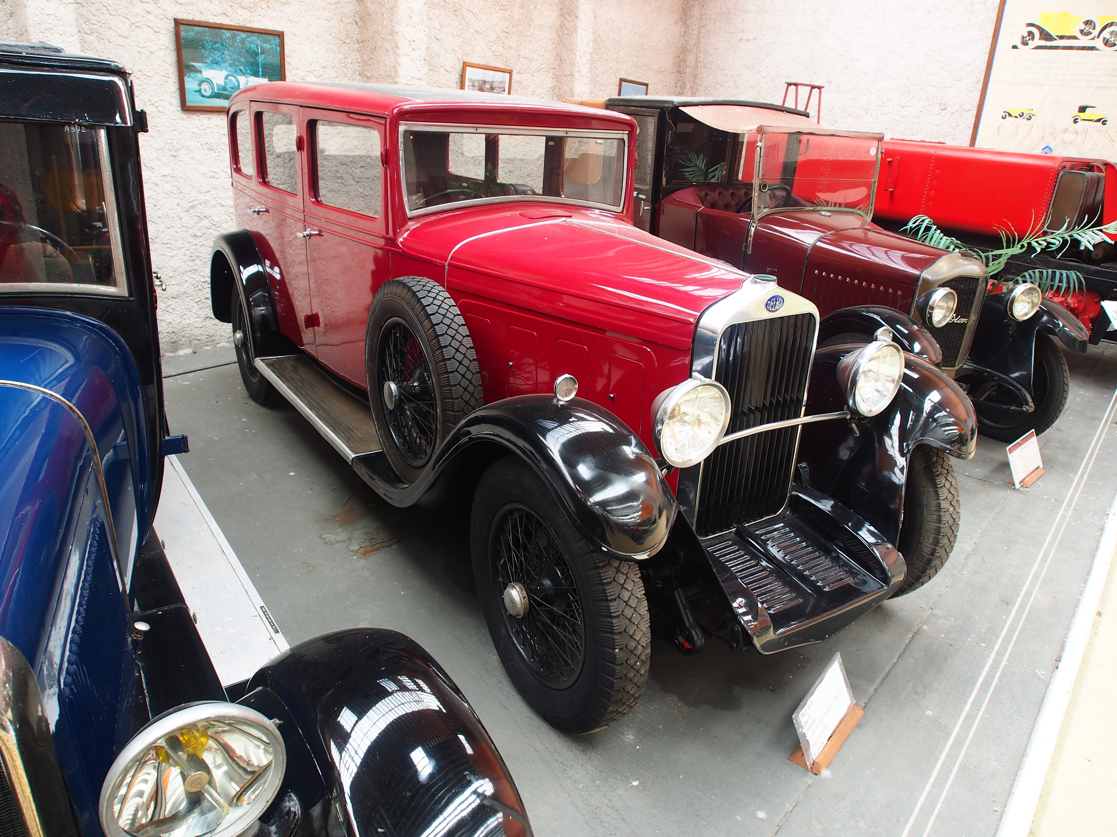 Photographed at the Association Lorraine des Amateurs d'Automobiles de collection et de loisirs.